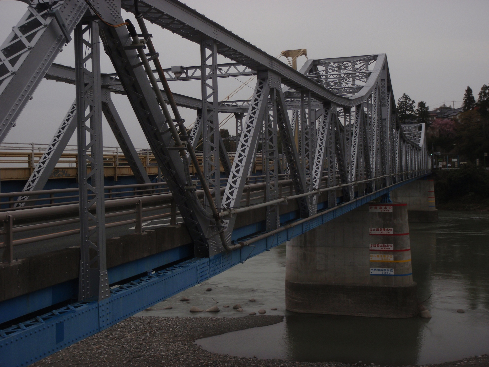 鹿島橋 (天竜川) 。浜松市天竜区に所在する、天竜川に架かる道路橋。